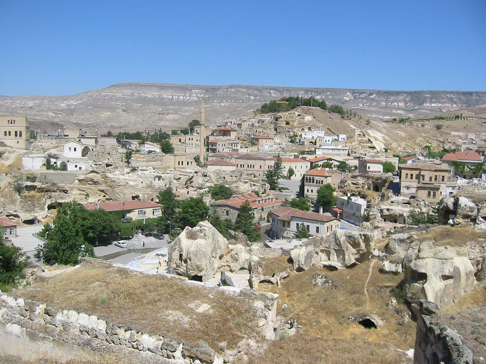 Градчето Мустафапаша, Кападокия, Турция.